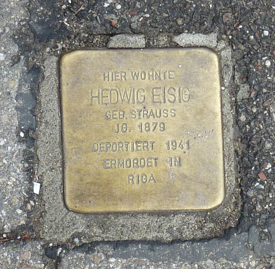 Stolperstein für Hedwig Eisig in der Heilbronner Oststraße 42